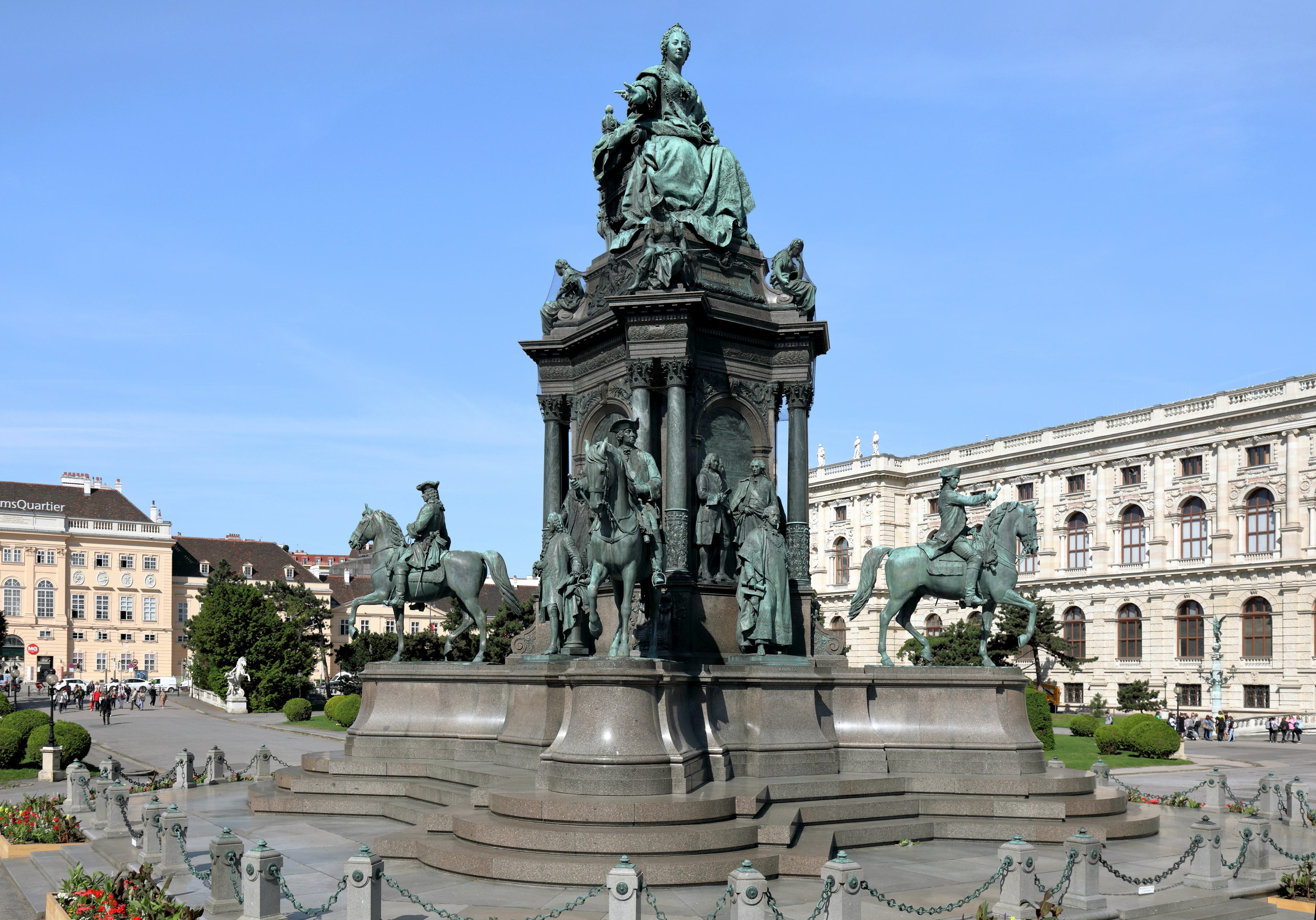 Das Maria-Theresien-Denkmal am Maria-Theresien-Platz im 1. Wiener Gemeindebezirk Innere Stadt.Das imposanteste Werk der neueren plastischen Kunst in Wien wurde in 13 Jahren (Modell 1874, Vollendung 1887) von Caspar von Zumbusch (Plastiken) und Carl von Hasenauer (Bauwerk) geschaffen und am 13. Mai 1888, dem Geburtstag der Herrscherin, enthüllt. Auf den 4 Flügeln des Unterbaus befinden sich die Reiterstandbilder der Feldherren Gideon Ernst Freiherr von Loudon, Leopold Graf Daun, Ludwig Andreas Graf Khevenhüller und Otto Ferdinand Graf Abensberg-Traun. Die 4 Seiten des mittleren Aufbaus behandeln jeweils eine Thematik (Berater der Kaiserin, Verwaltung, Militär sowie Wissenschaft und Kunst. Wobei jeweils eine frei stehende Figur dargestellt ist (Berater: Wenzel Anton Dominik Graf Kaunitz; Verwaltung: Staatskanzler Friedrich Wilhelm Graf Haugwitz, Schöpfer der Verwaltungsreform; Militär: Joseph Wenzel Fürst Liechtenstein, Reorganisator des Geschützwesens; Wissenschaft und Kunst: Leibarzt Gerard van Swieten, Reformator der Universität) und 16 Figuren vor den Hochreliefs in den 4 Bogenfeldern.